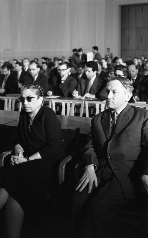 Berlin, Prozess gegen Theodor Oberländer Zentralbild/Zühlsdorf 20.4.1960 Hauptverhandlung gegen Theodor Oberländer eröffnet Vor dem 1. Strafsenat des Obersten Gerichts der DDR in Berlin hat am 20 4. 1960 die Hauptverhandlung gegen den Bonner Minister Theodor Oberländer begonnen. Die Anklageschrift des Generalstaatsanwalt der DDR ist dem Angeklagten rechtzeitig zugestellt worden.Oberländer hat maßgeblich die faschistische Aggressionspolitik zur Ausrottung und Versklavung der osteuropäischen Völker unterstützt und an der Vernichtung des Lebens zahlloser Menschen mitgewirkt. Während der Verhandlung. Vorn links: der Minister der Justiz der DDR, Frau Dr. Hilde Benjamin und rechts: Staatssekretär Heinrich Toeplitz. Abgebildete Personen: Benjamin, Hilde: Ministerin für Justiz, Mitglied des ZK der SED, DDR (GND 11885058X) Toeplitz, Heinrich Dr.: Staatssekretär für Justiz, Präsident des Obersten Gerichts, CDU, Gesellschaft für deutsch-sowjetische Freundschaft (DSF), DDR